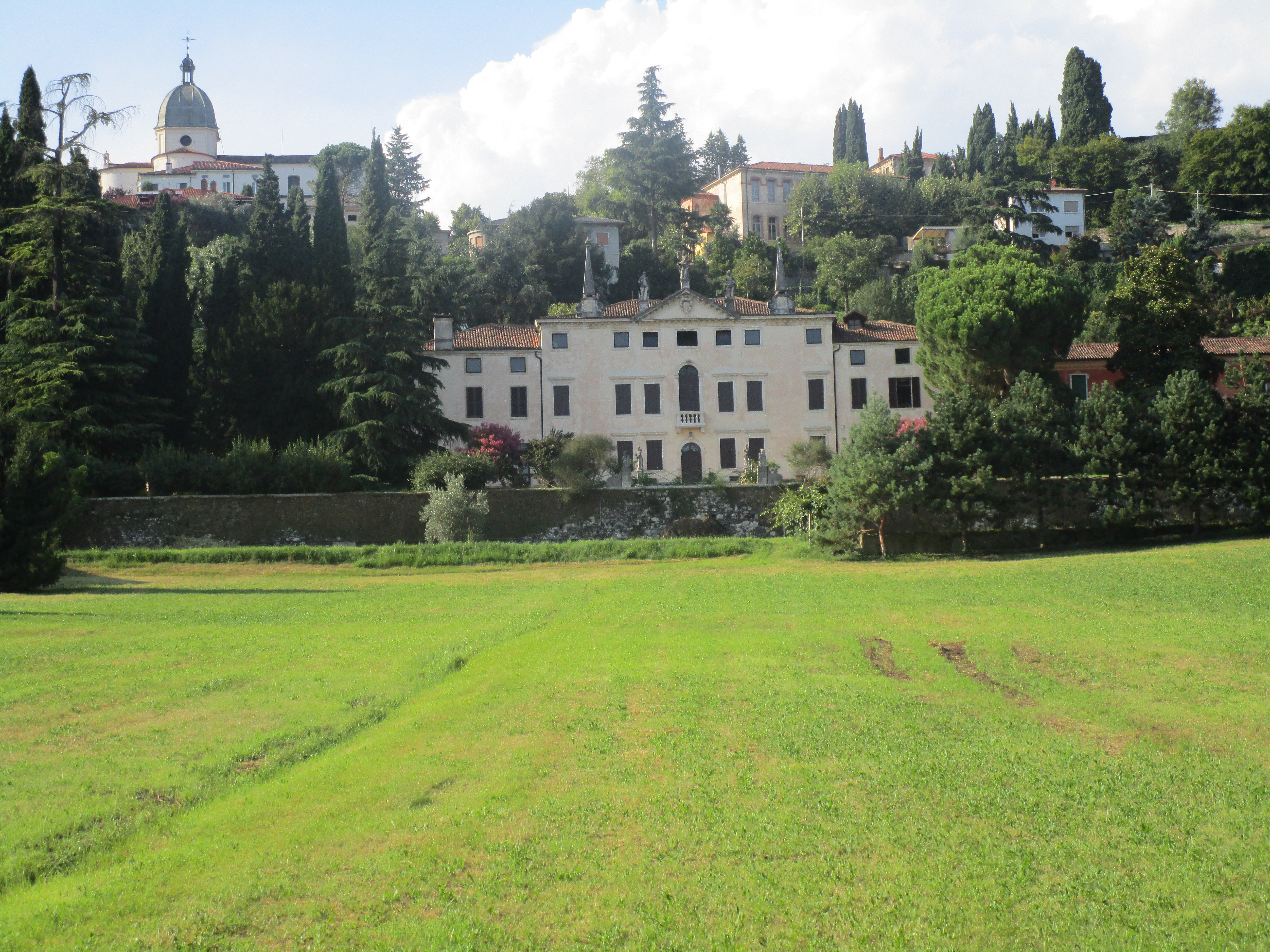 Trissino, Villa Caliari Bassani Dalle Ore Buffa (1674)